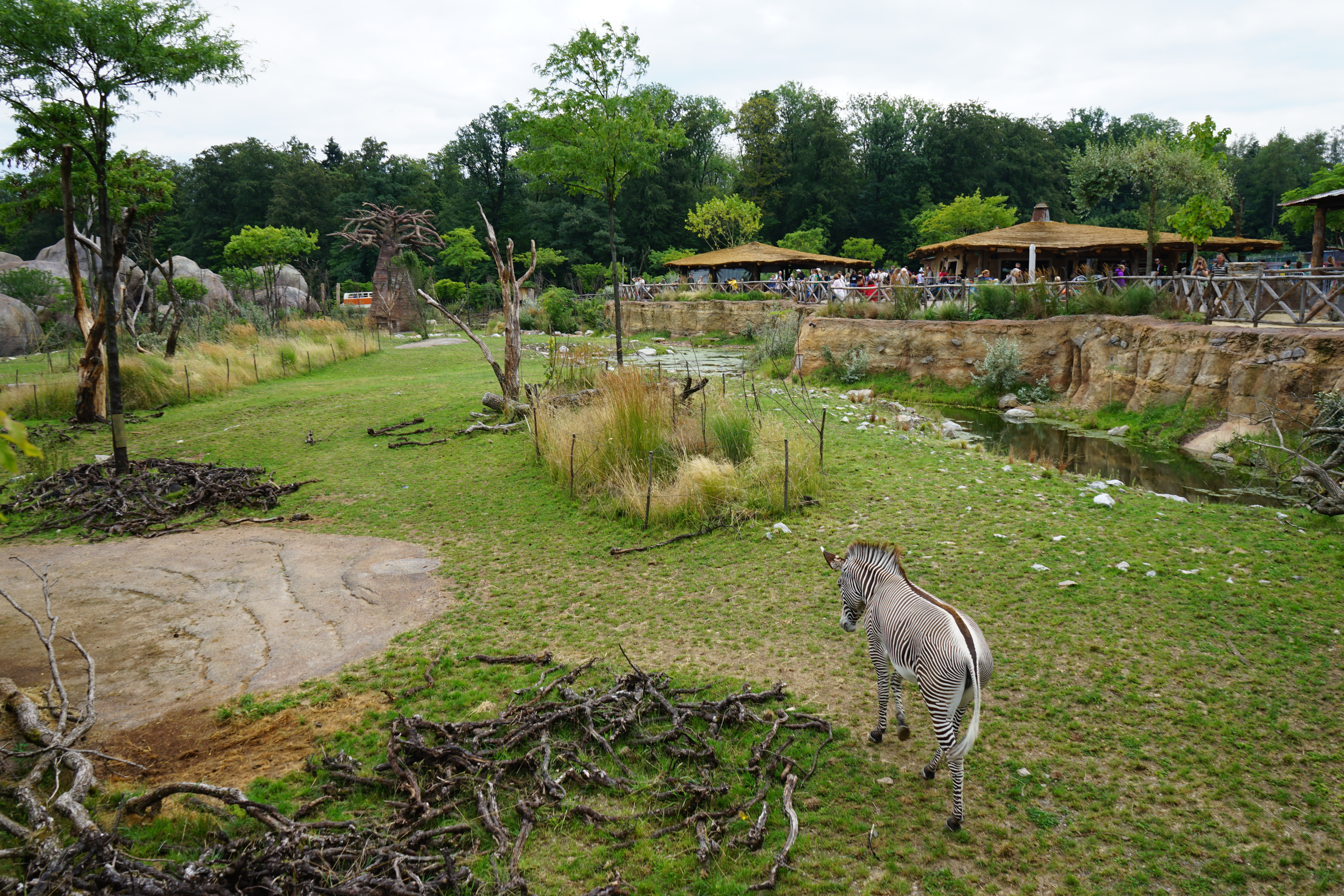 Grevyzebra (Equus grevyi) unterwegs in der Lewa-Anlage im Zoo Zürich